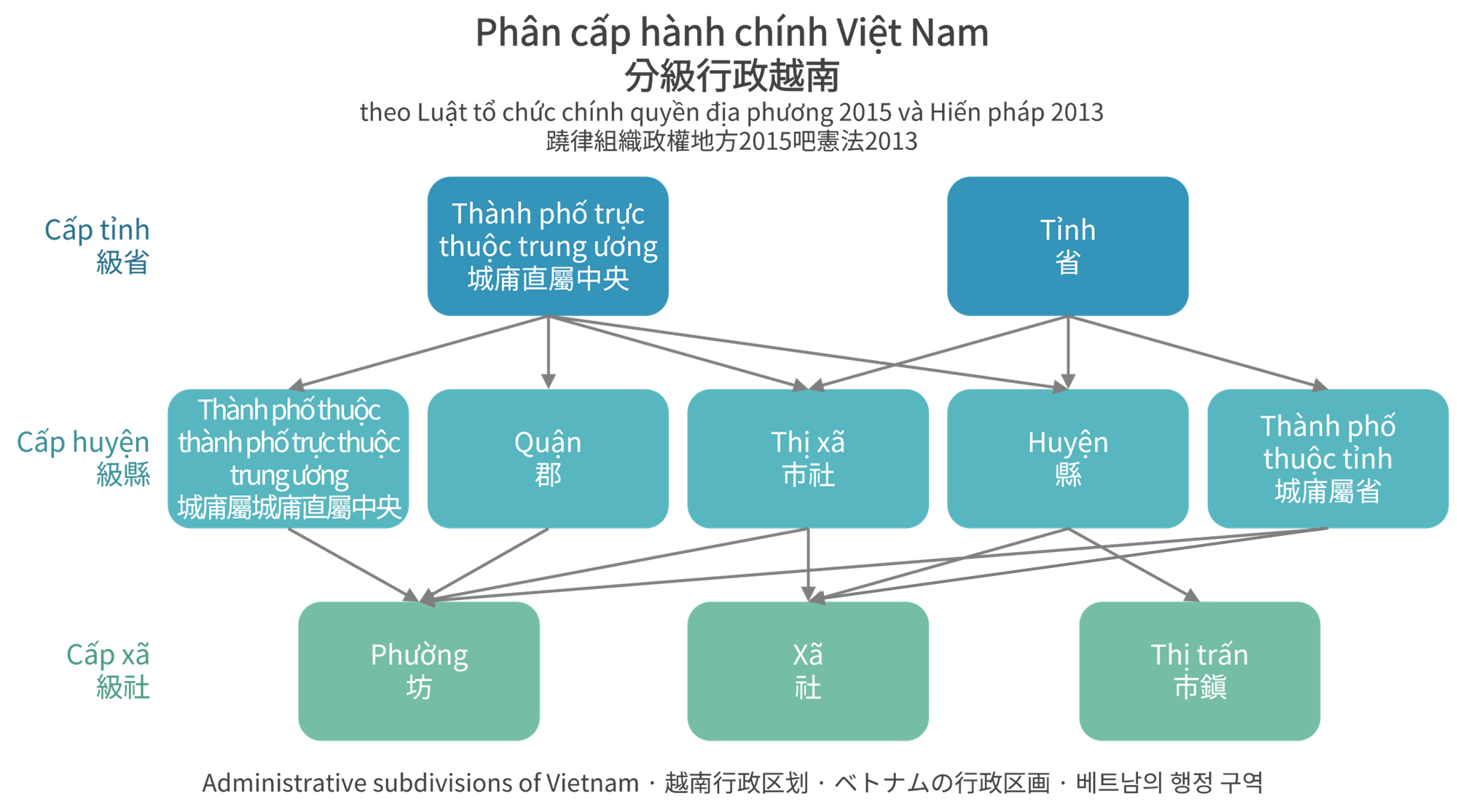 ベトナムの行政区画